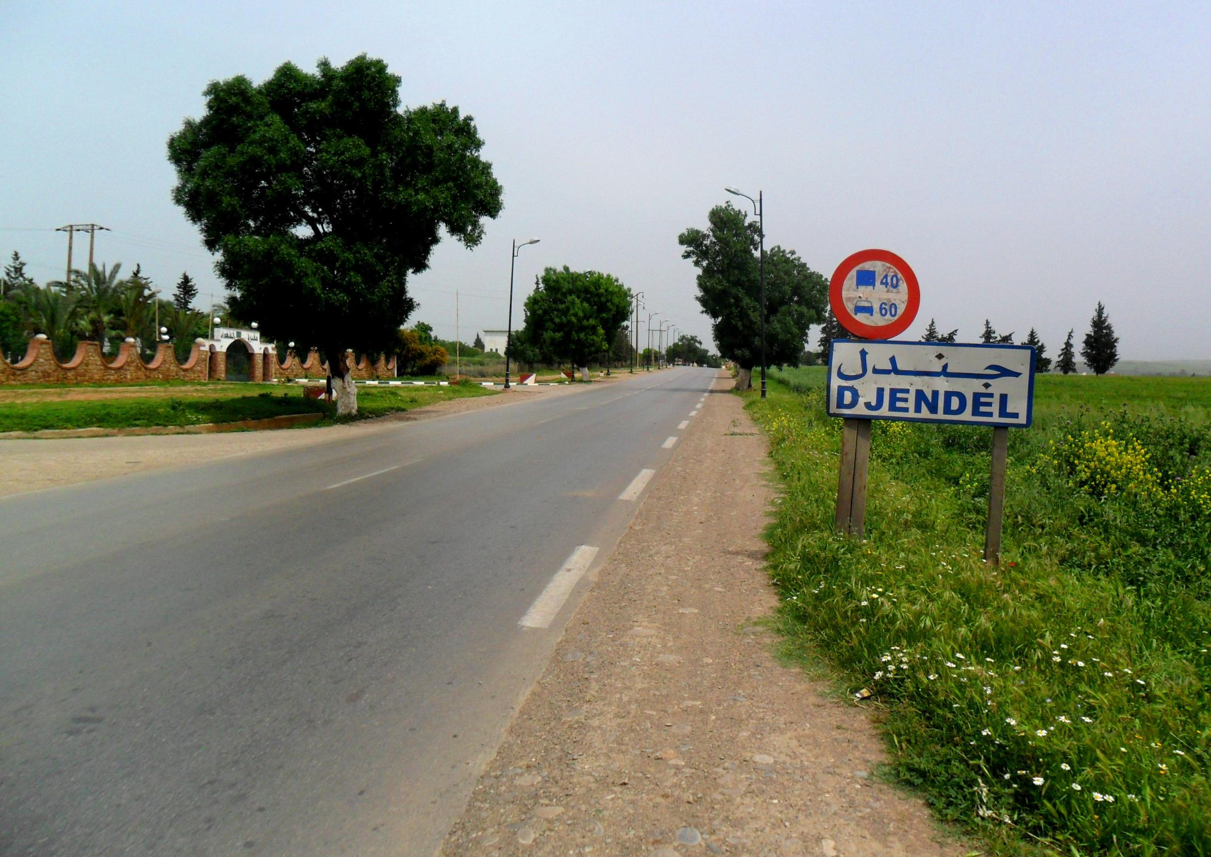 Djendel جندل